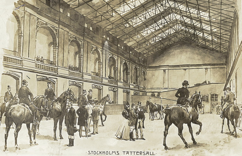 Tattersall, Ridhuset (Riddaren 10)